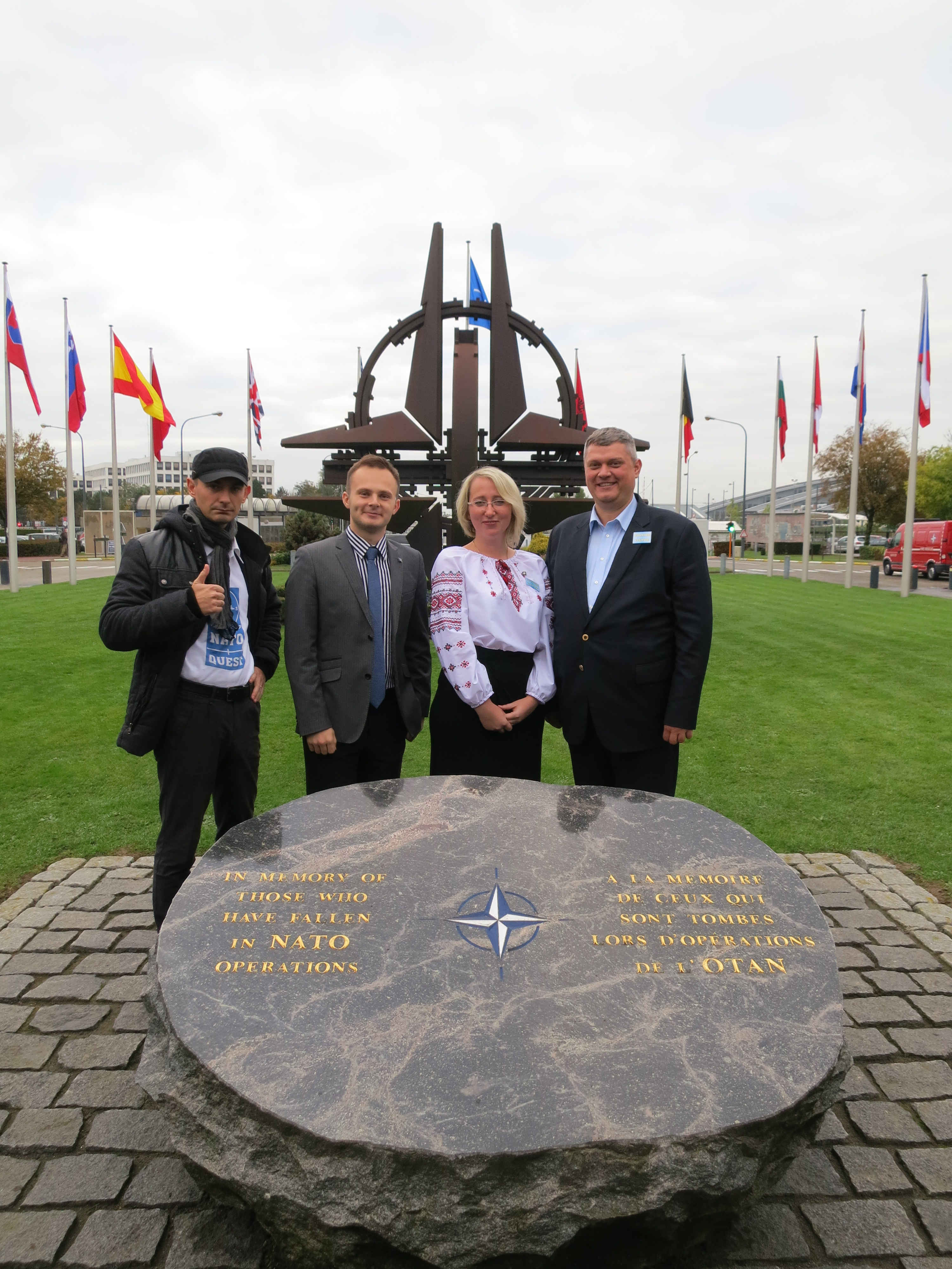 Переможці вікторини НАТО-квест в Брюсселі.